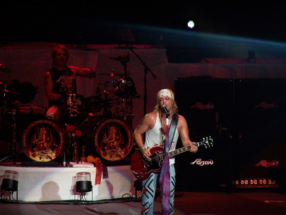 Poison image